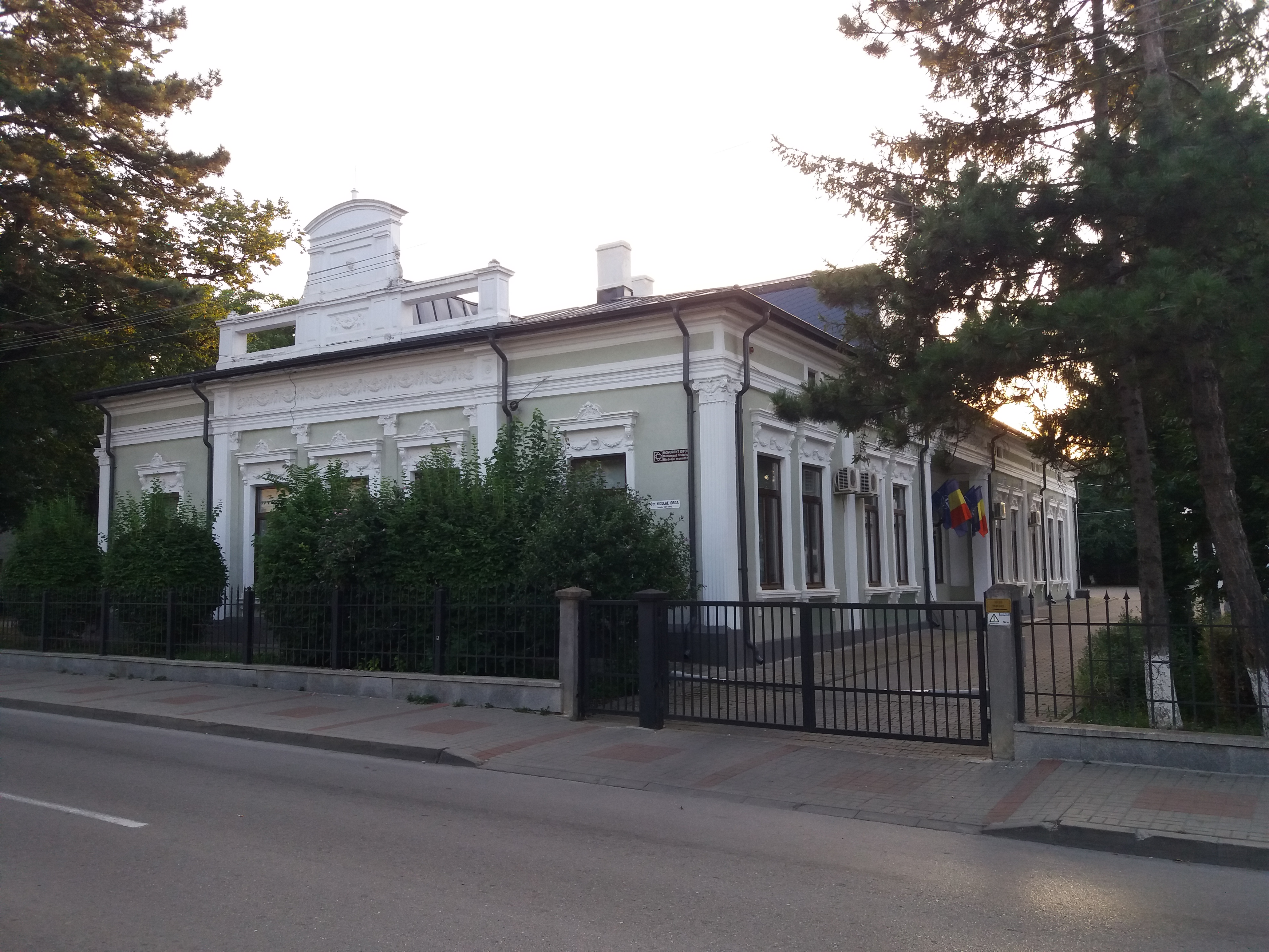 Casa Abete din municipiul Botoșani. Astăzi Inspectoratul Școlar Județean Botoșani.